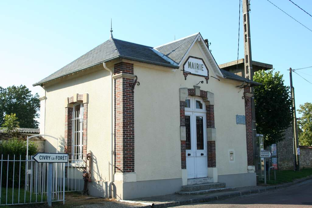 Mairie de Mulcent - Yvelines (France)